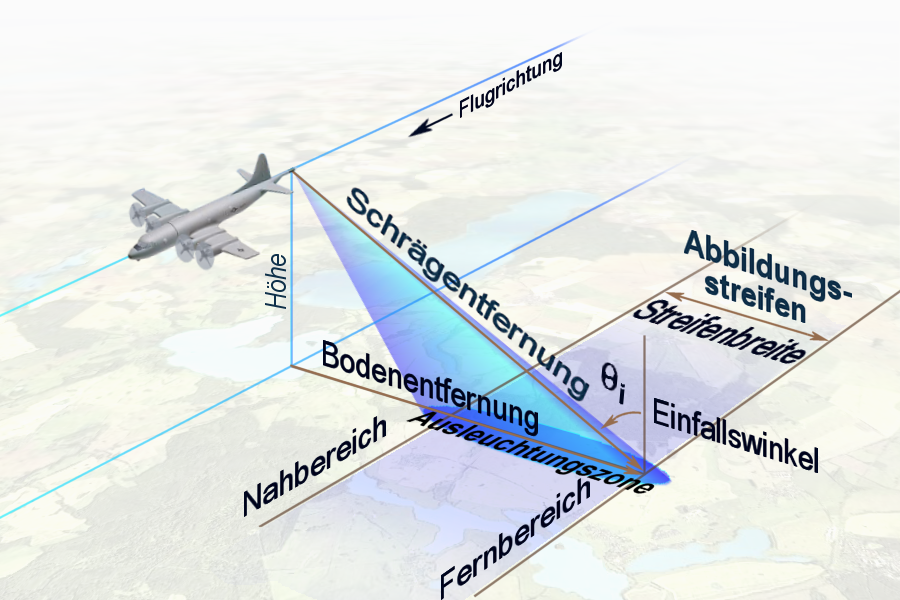 Geometrie eines SLAR